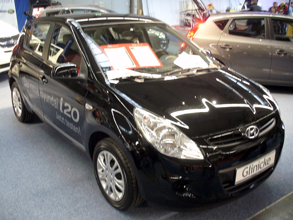 Hyundai i20